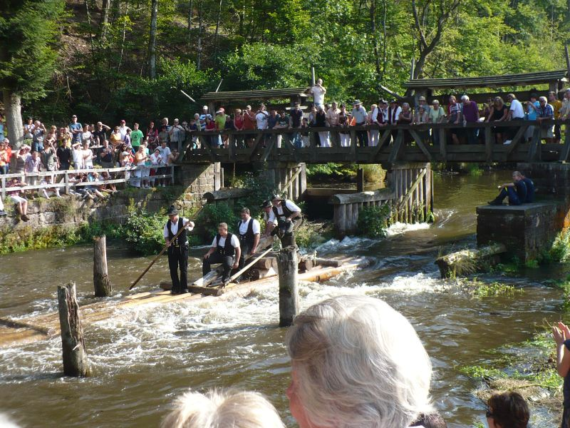 Monhardter Wasserstube, Altensteig, Baden-Württemberg, Germany